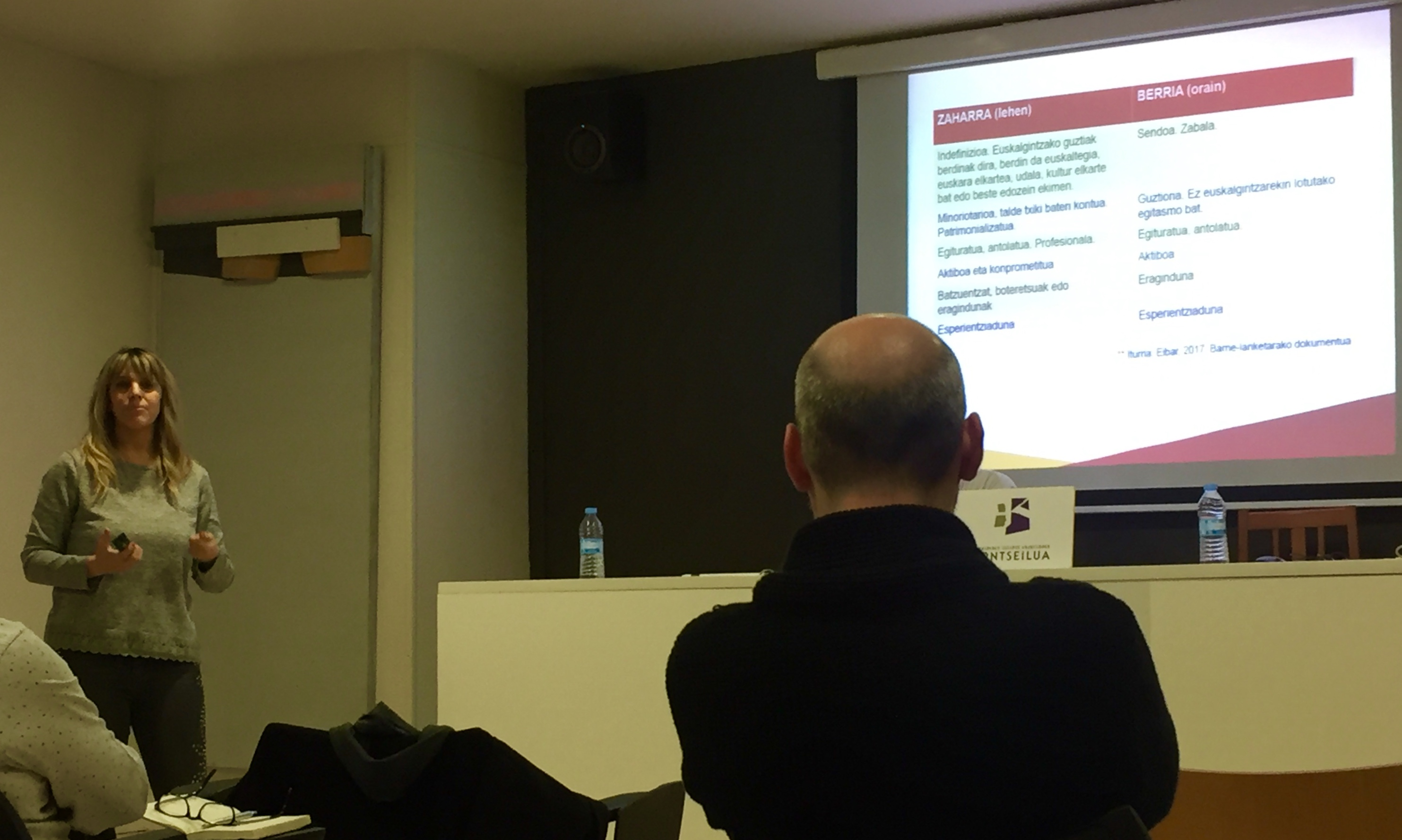 Estitxu Garai hizlari